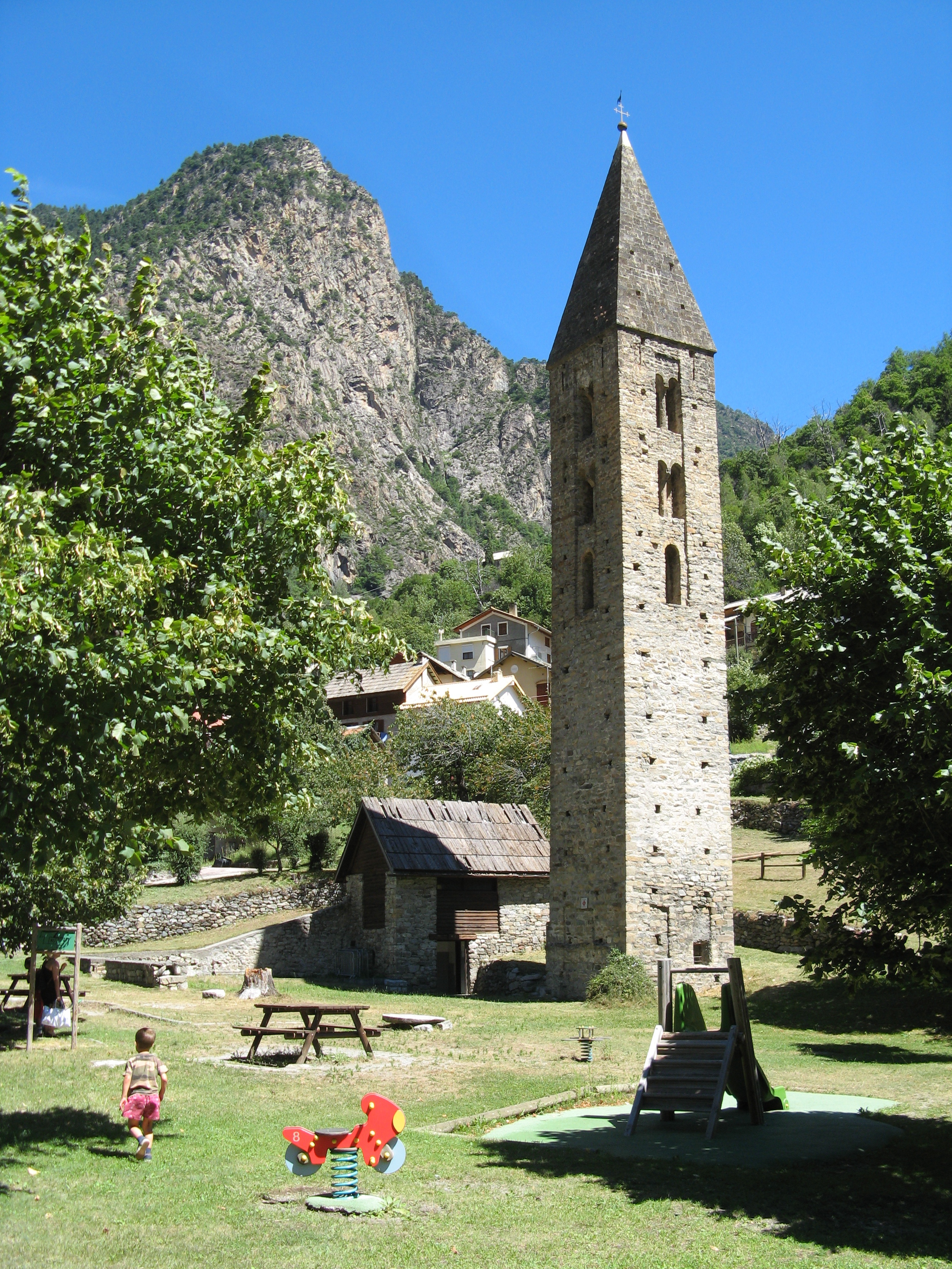 Isola (Alpes-Maritimes) : le clocher roman du XIIème siècle, vestige de l'ancienne église Saint-Pierre aujourd'hui disparue.